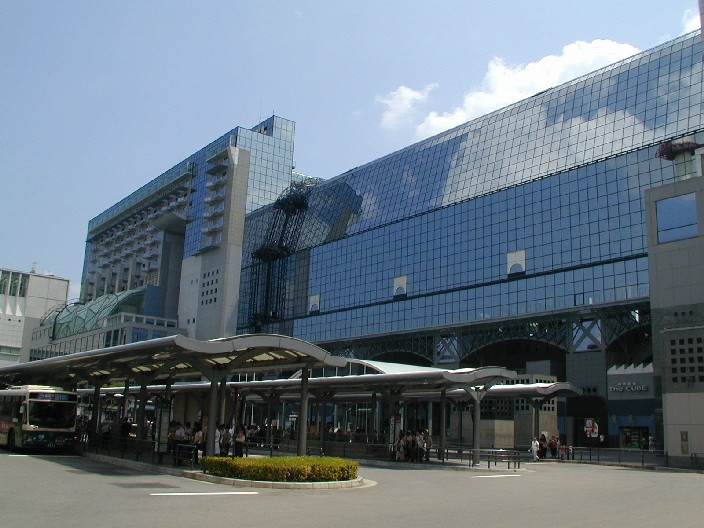 Kyoto stazione ferroviaria esterno La foto è stata scattata da me a Kyoto (Giappone) nell'agosto 2002